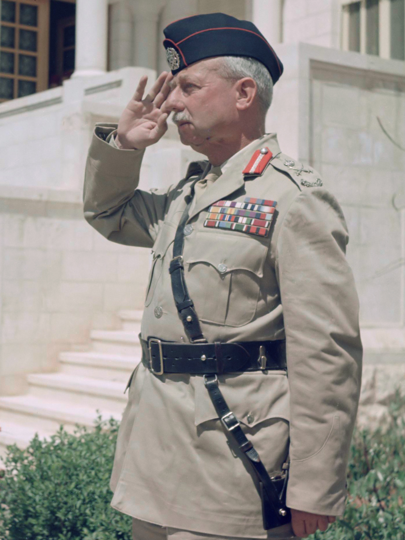 Glubb Pasha en koning Hussein bij een parade van de erewacht van het Arab Legion van het Jordaanse leger bij het paleis 1953